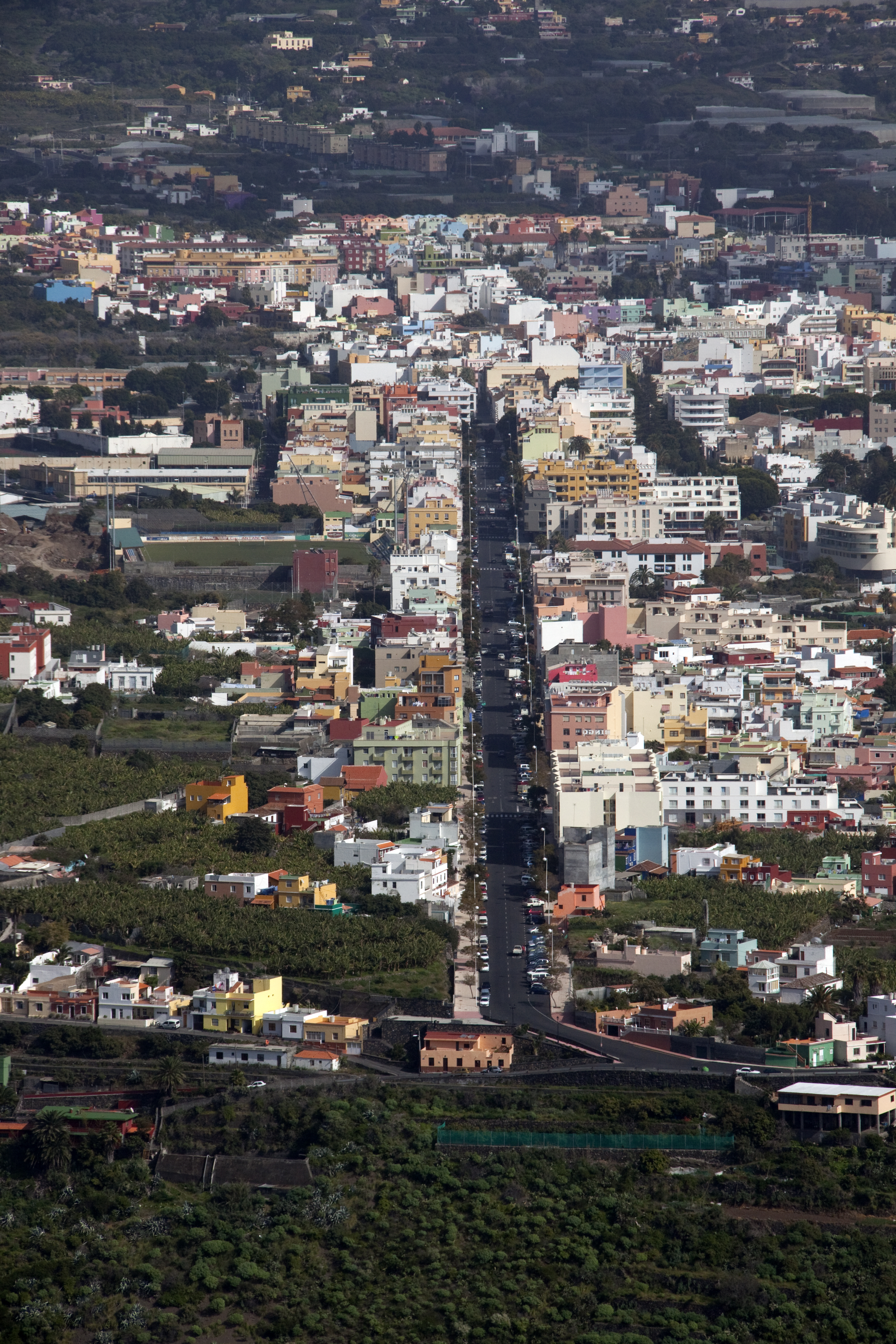 Los Llanos